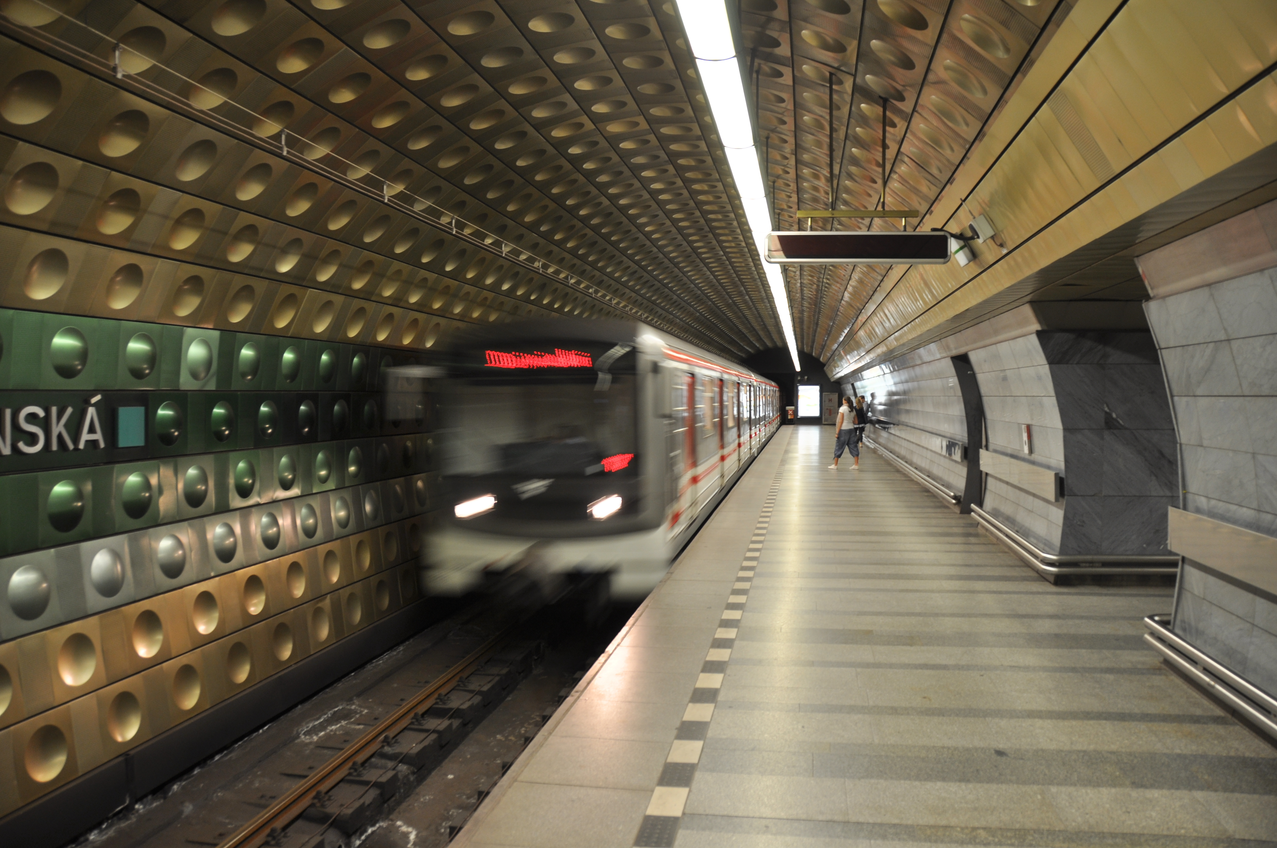 Metro Praha